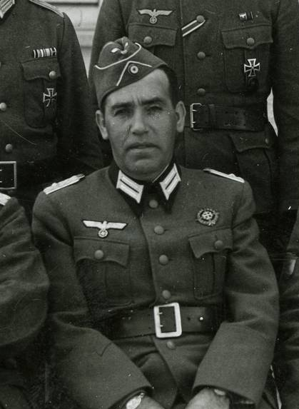 Personajes: Gómez Zamalloa, Mariano Fotografía de oficiales alemanes y españoles. Gómez Zamalloa sentado, segundo por la izquierda